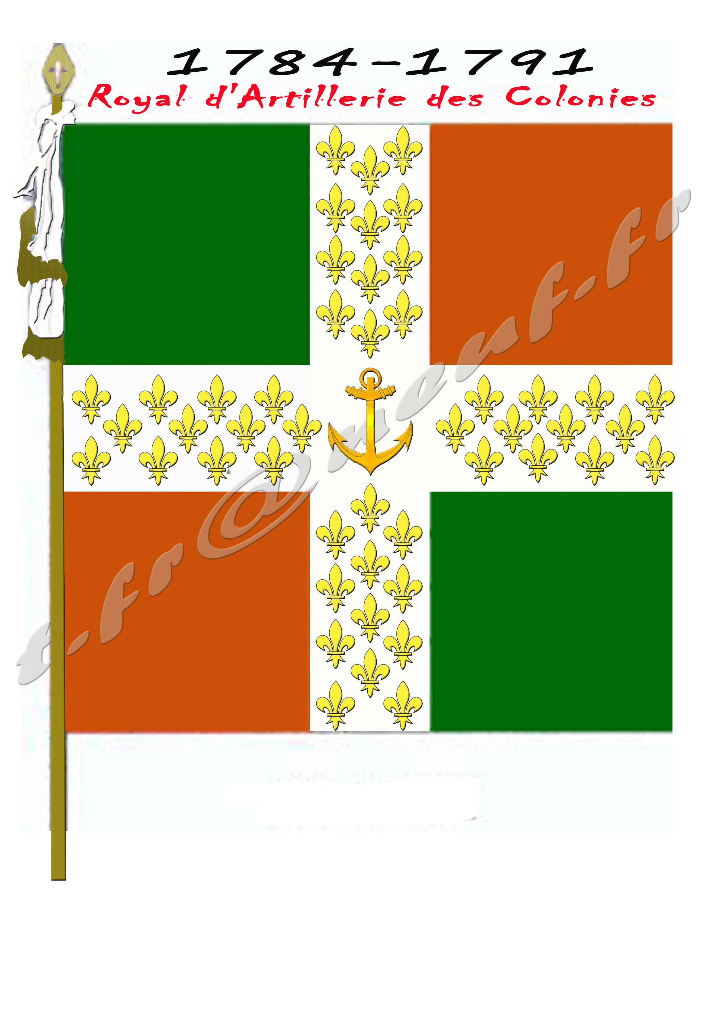 Drapeau du Royal d'artillerie des colonies